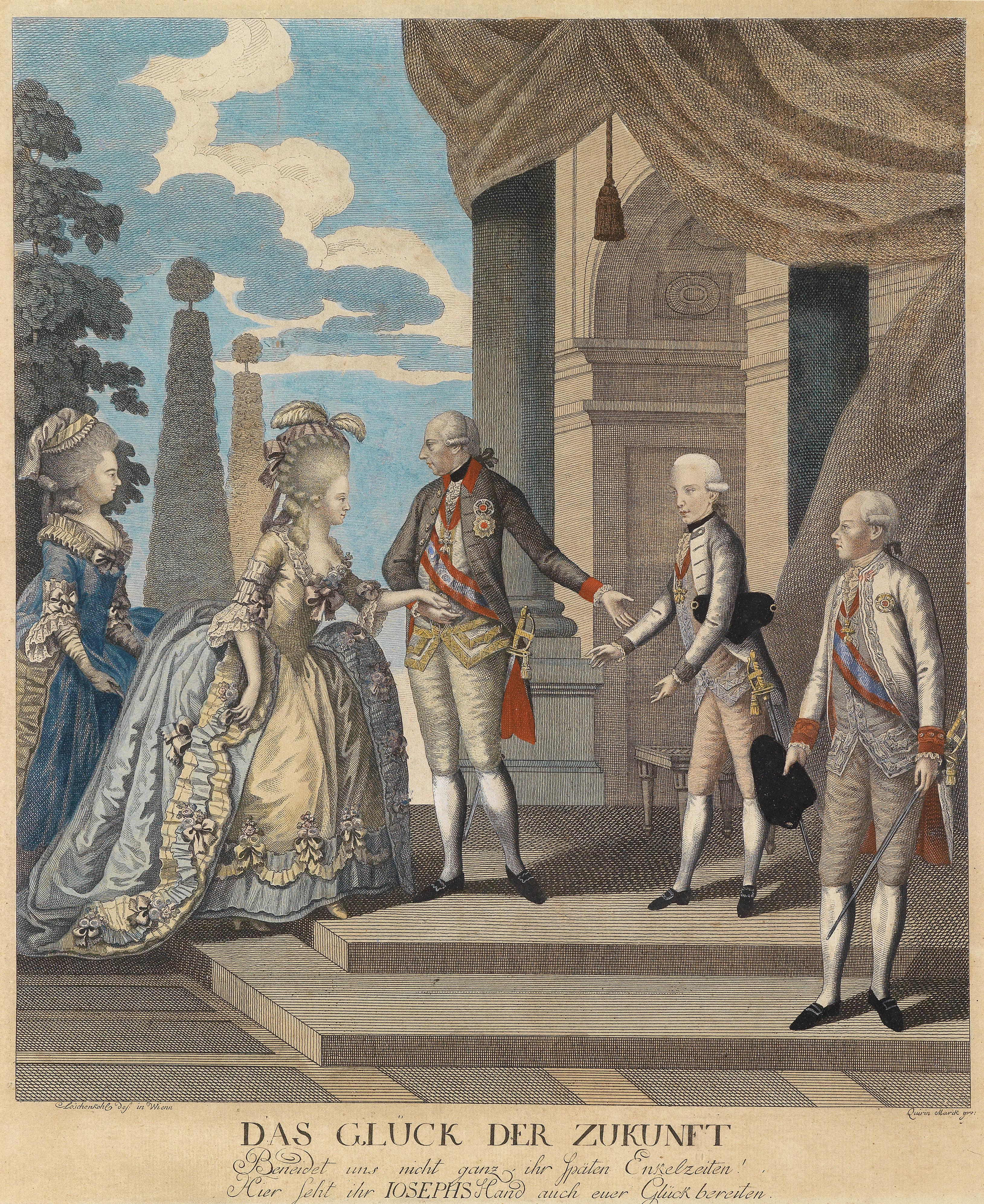 Kaiser Joseph II. mit dem späteren Kaiser Franz II.(I.) und dessen erster Gemahlin Elisabeth Wilhelmine von Württemberg,title QS:P1476,de:"Kaiser Joseph II. mit dem späteren Kaiser Franz II.(I.) und dessen erster Gemahlin Elisabeth Wilhelmine von Württemberg," label QS:Lde,"Kaiser Joseph II. mit dem späteren Kaiser Franz II.(I.) und dessen erster Gemahlin Elisabeth Wilhelmine von Württemberg,"